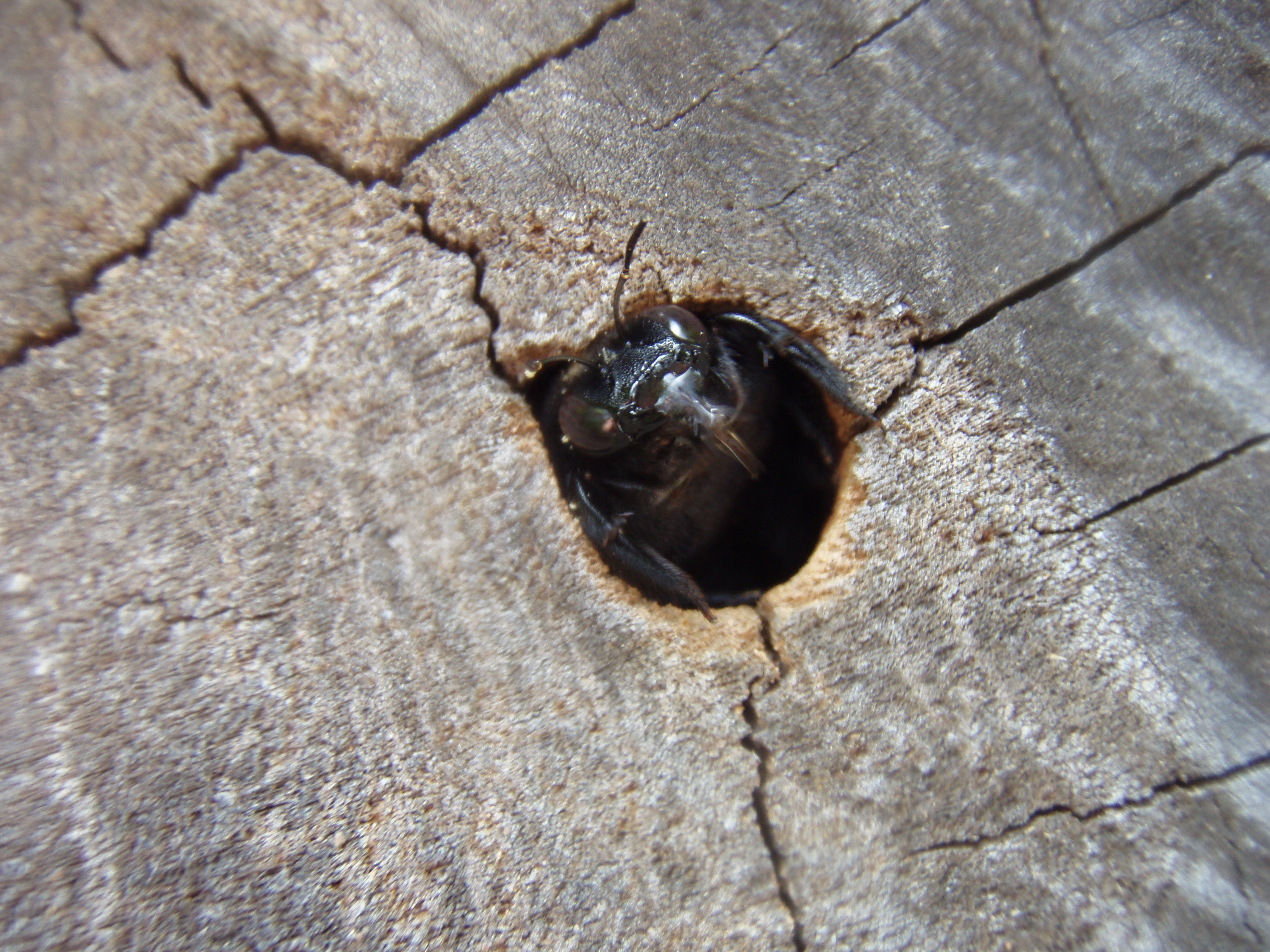 Carpenter Bee